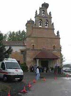 Ermita del Cristo de Morales del Vino